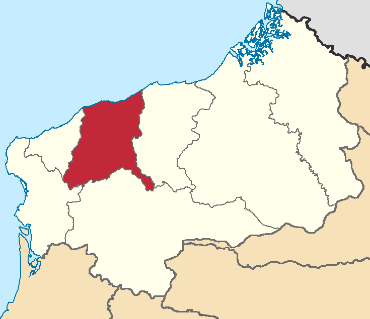 Mapa localizacor del cantón Esmeraldas, Esmeraldas, Ecuador